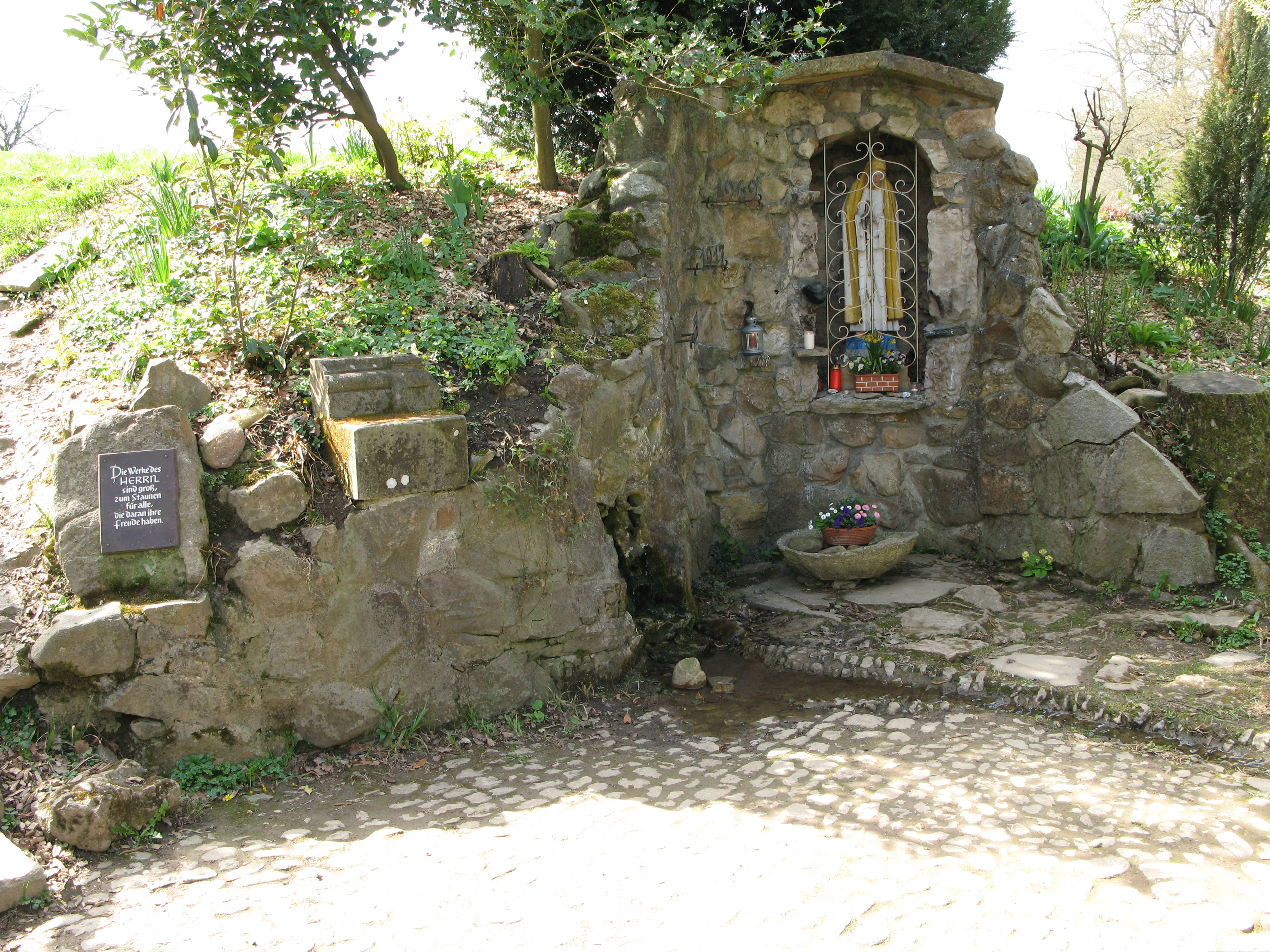 Lourdes-Grotte bei Ehrenstetten am Fernwanderweg Markgräfler Wiiwegli im Markgräflerland.